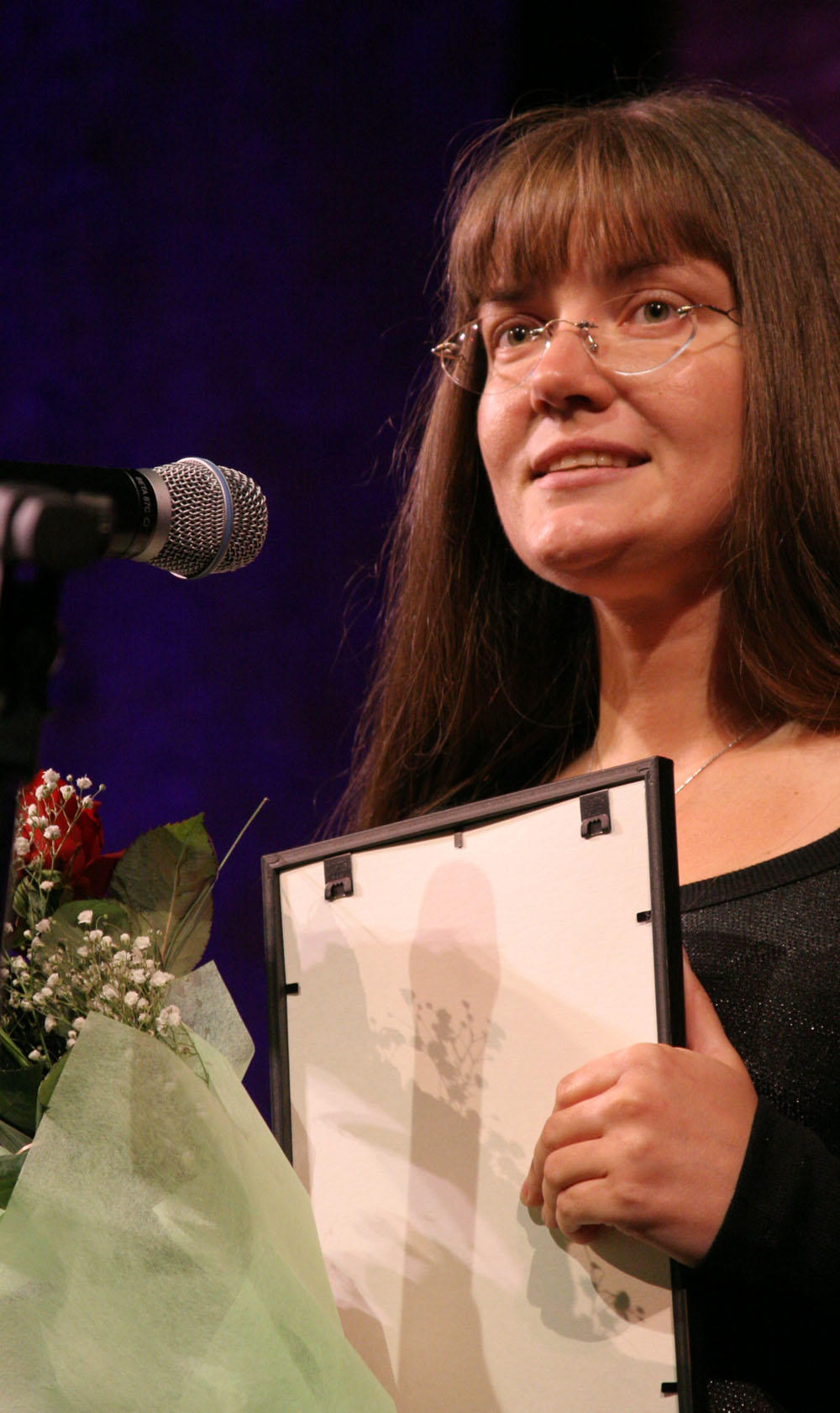 Ксения Степанычева на церемонии вручения призов фестиваля Золотой Арлекин.